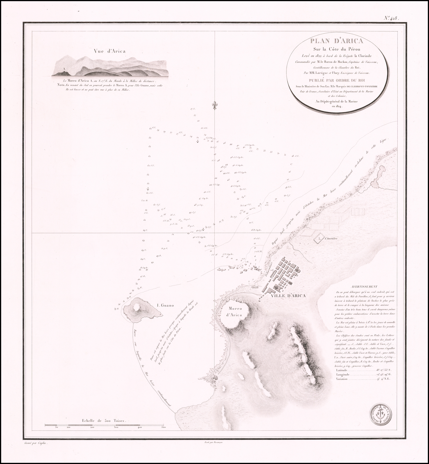 Plan d'Arica, sur la cote du Perou. Leve en 1822 a bord de la Fregate la Clorinde, commandee par M. le Baron de Mackau, Capitaine de Vaisseau, Gentilhomme de la Chambre du Roi. Par MM. Lartigue et Flury, Enseignes de Vaisseau. Publiee par ordre du Roi. Sous le Ministere de Son Exc. M. le Marquis de Clermont-Tonnerre, Pair de France, Secretaire d'Etat au Departement de la Marine et des Colonies. Au Depot-general de la Marine en 1824. Grave par Caplin. Ecrit par Besancon. Joseph Lartigue (1791-1876). France. Depot-general de la Marine, 1824.